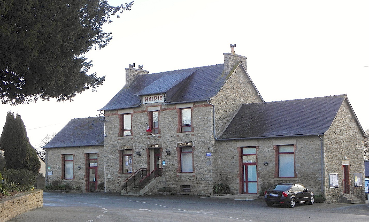 Mairie de Plorec-sur-Arguenon (22).